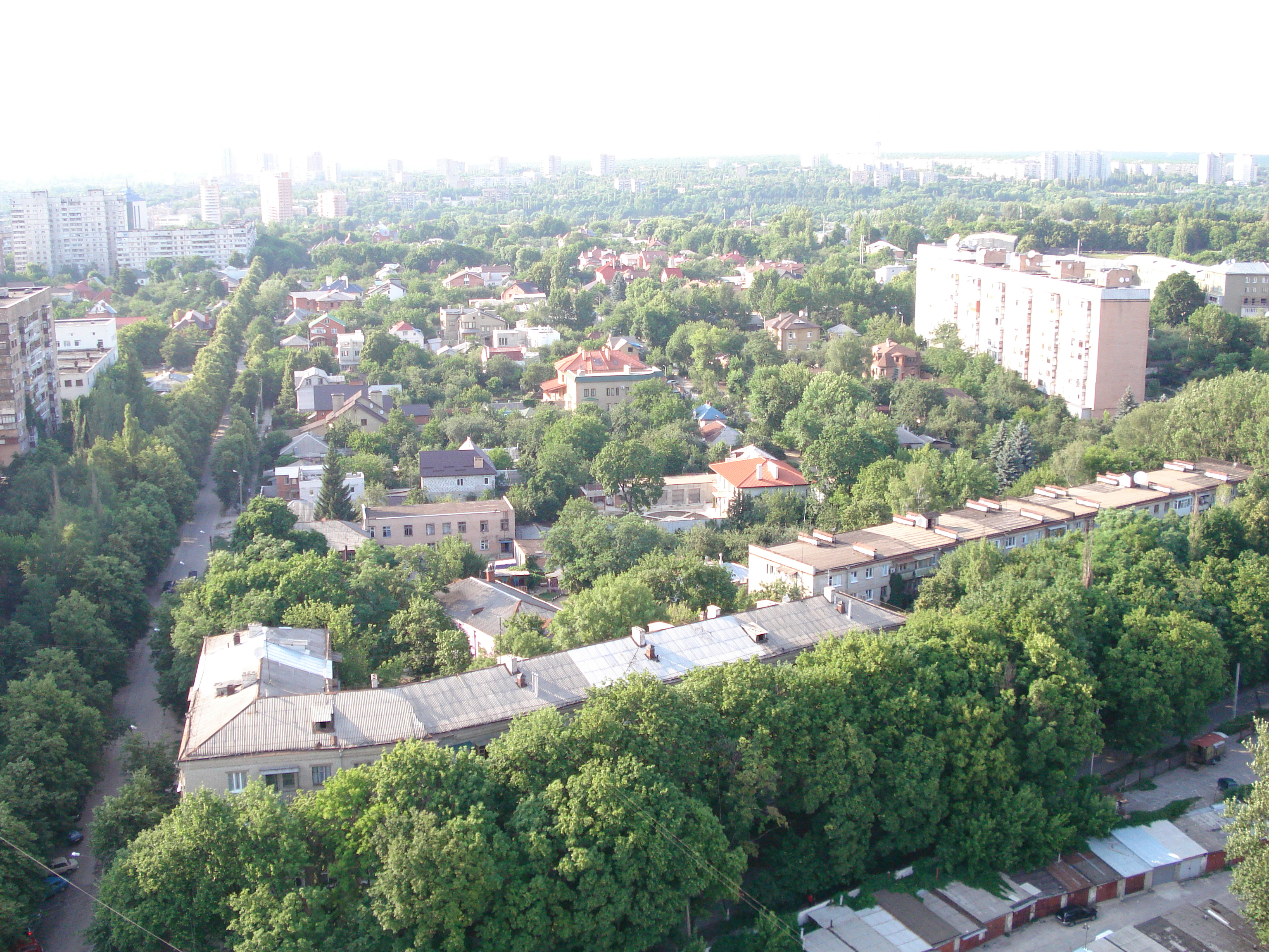 Улица Ленина на Шатиловке в сторону Саржина Яра Харьков. Фото с отметки + 70 м Ленина улица на Шатиловке